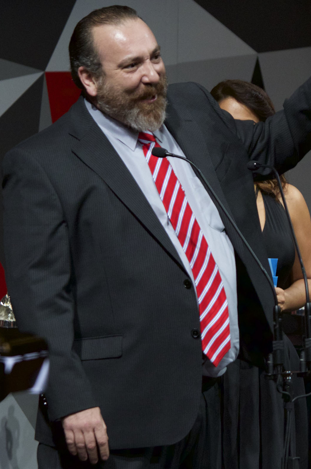 Martes 11 de julio de 2017. En el Palacio de Bellas Artes, se realizó la ceremonia número 59 de la entrega de Premios de la Academia Mexicana de Cinematografía, Ariel. Encabezado por su presienta la actriz Dolores Heredia. MEJOR ACTOR DE CUADRO, Hernán Mendoza, por La 4ª compañía. Fotografía: Milton Martínez / Secretaría de Cultura CDMX.